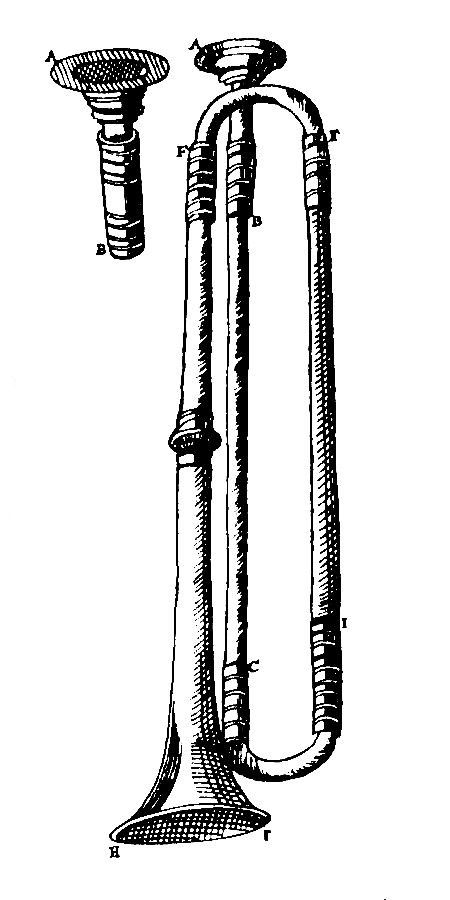 Trombita ábrázolása Mersenne-nél